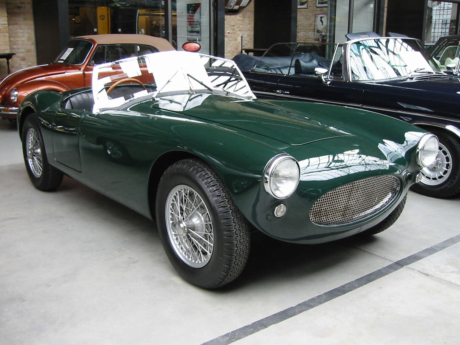 'Aston Martin DB1 SPA' Paul Jackman Special 1953/48, Frühjahr 2010 im Meilenwerk Berlin.